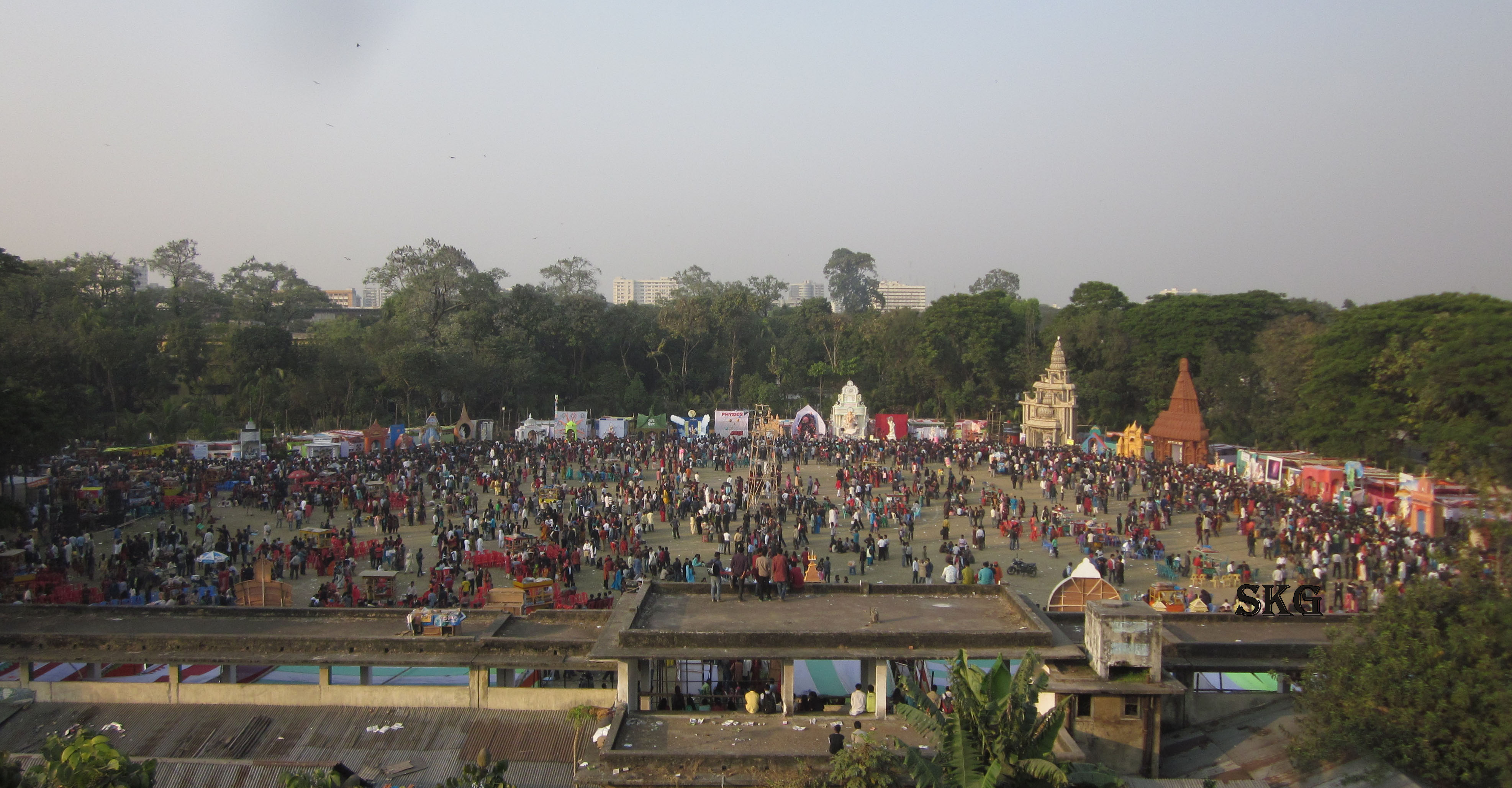 জগন্নাথ হলের মাঠে সরস্বতী পূজা